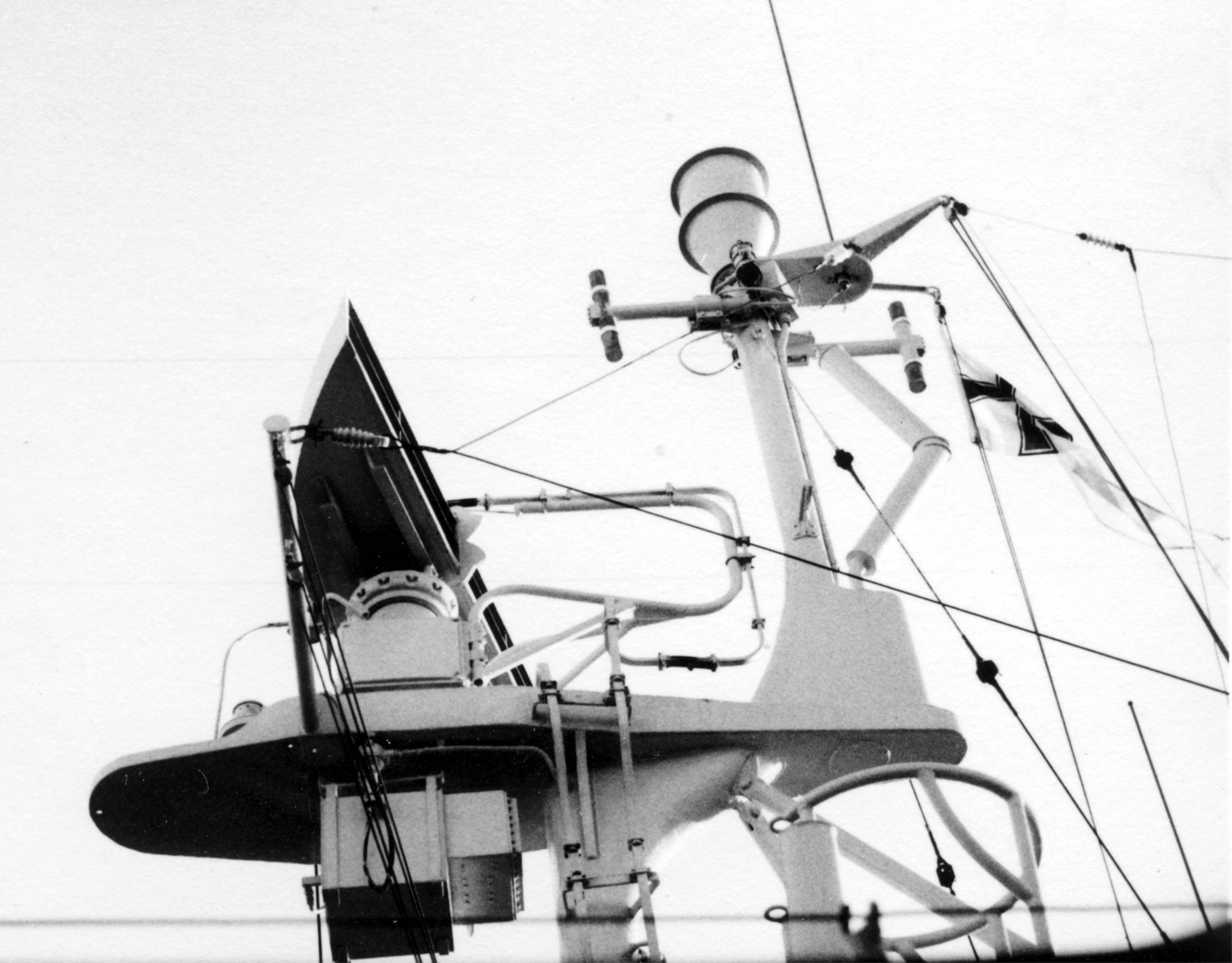 Radaranlage